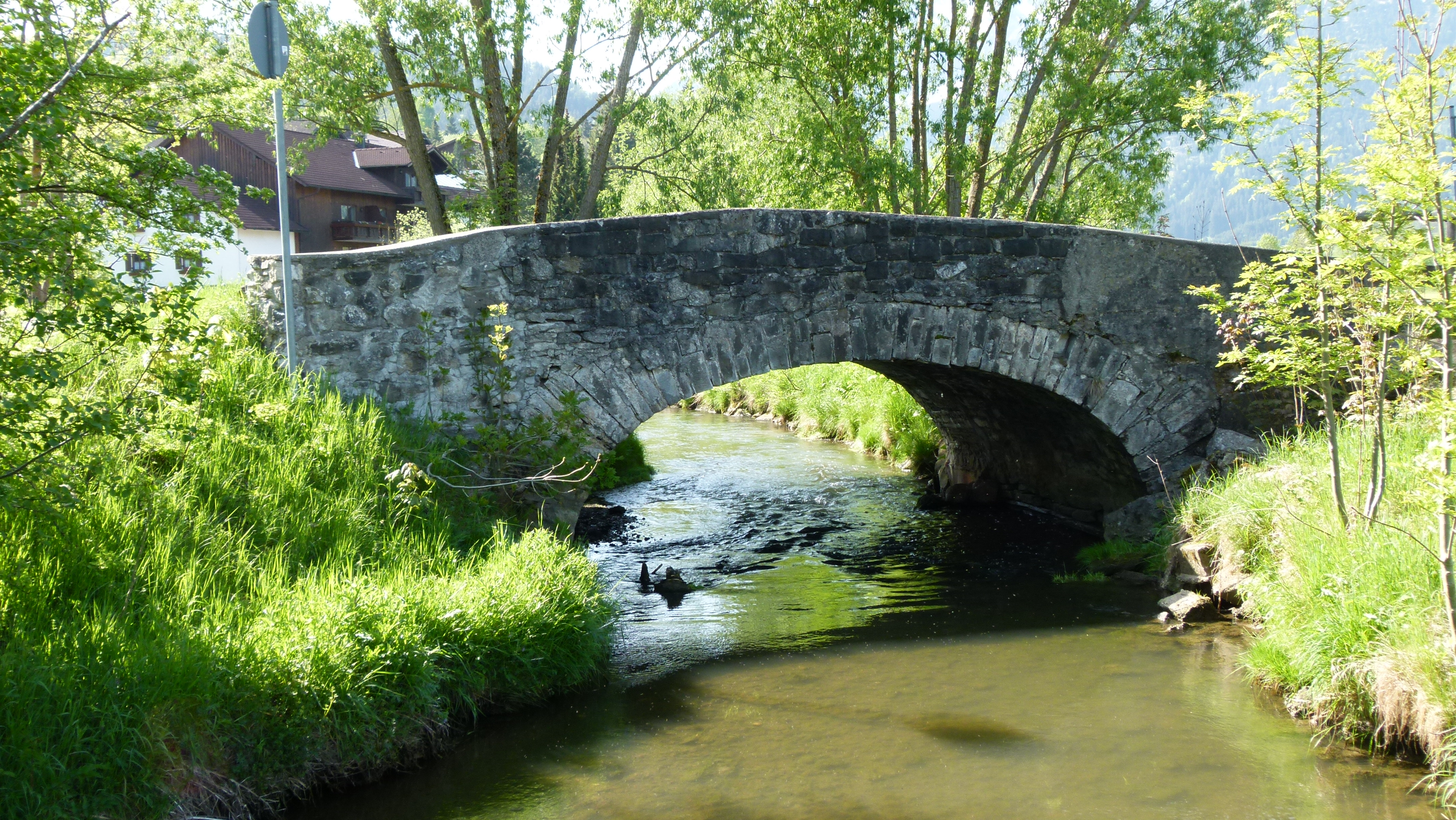 Brücke der Straße von Pfronten-Ried nach Pfronten-Meilingen über die Faule Ach